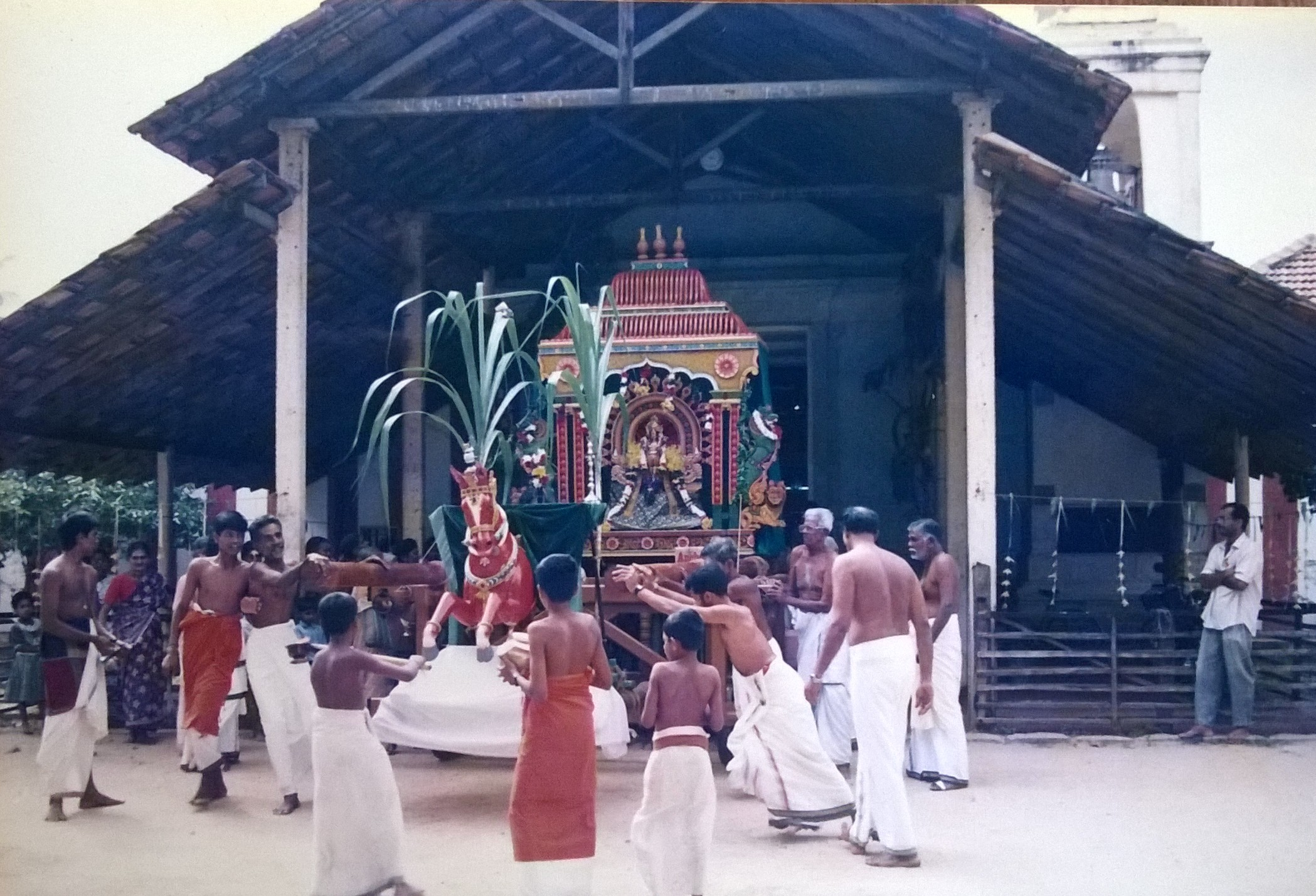 திருவிழாவின் பொழுது எடுக்கப்பட்டவை